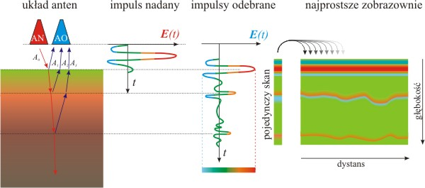 Zasd dziłni GPR